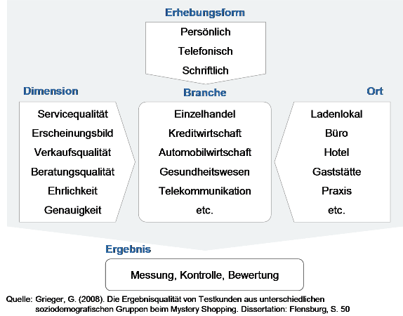 Mystery Shopping - Erhebungsformen